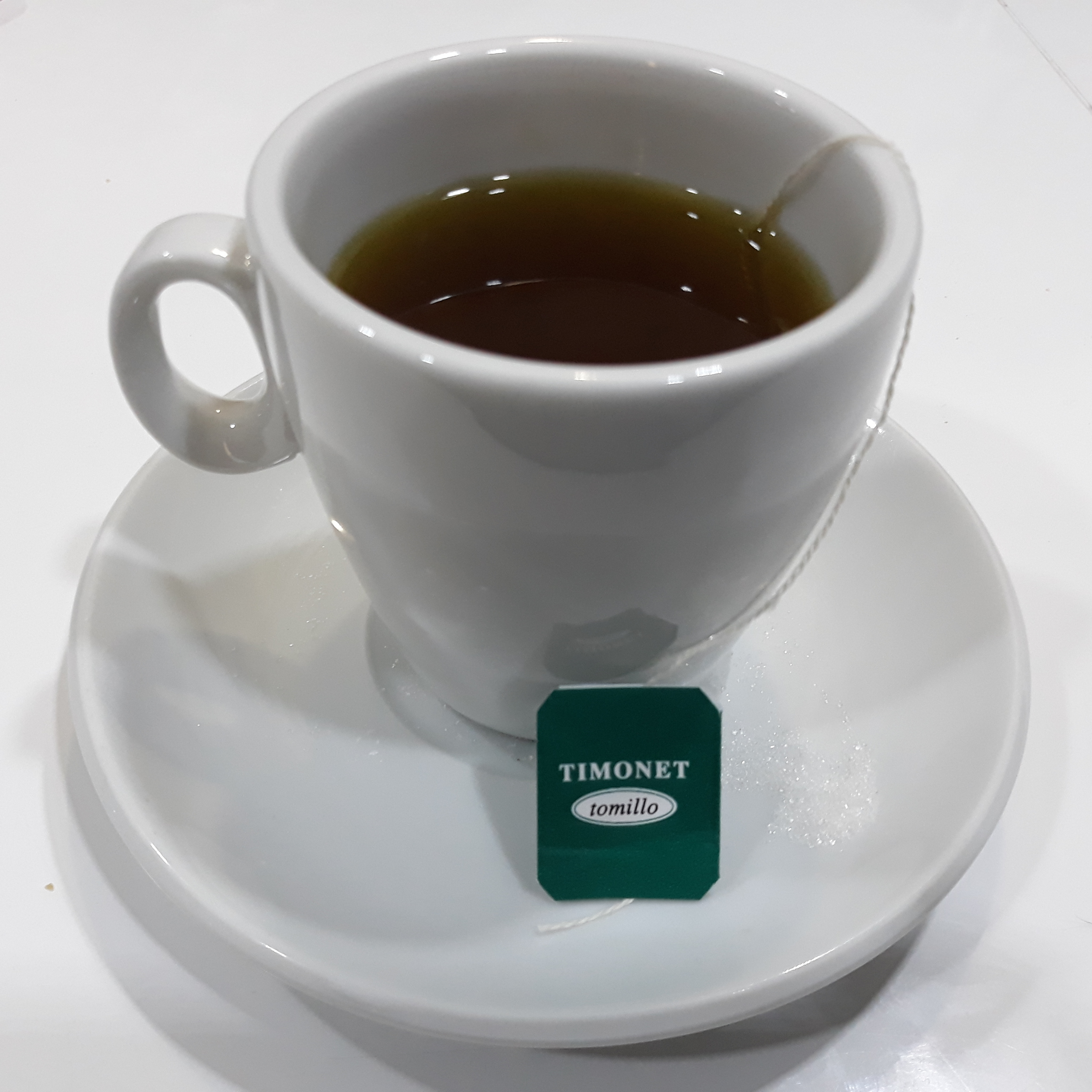 2020-02-12 Timonet a Alcoi